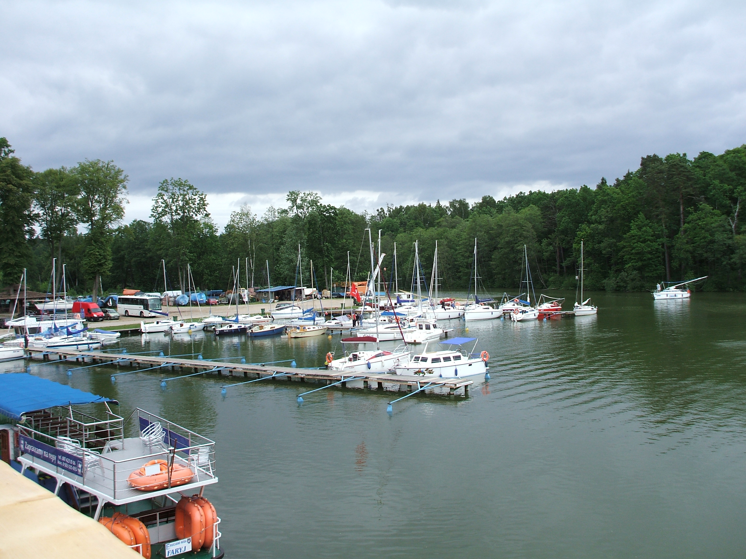 Przystań w Rucianym-Nidzie